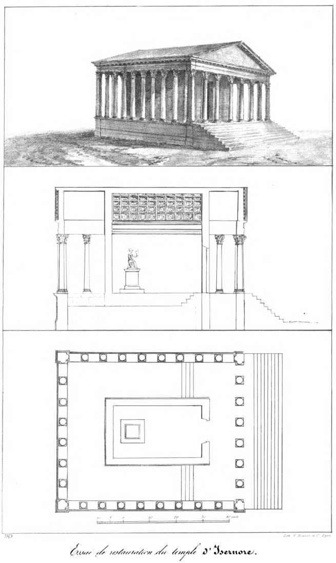 Reconstitution (dessin) du temple romain d'Izernore in Saint-Didier, 1837